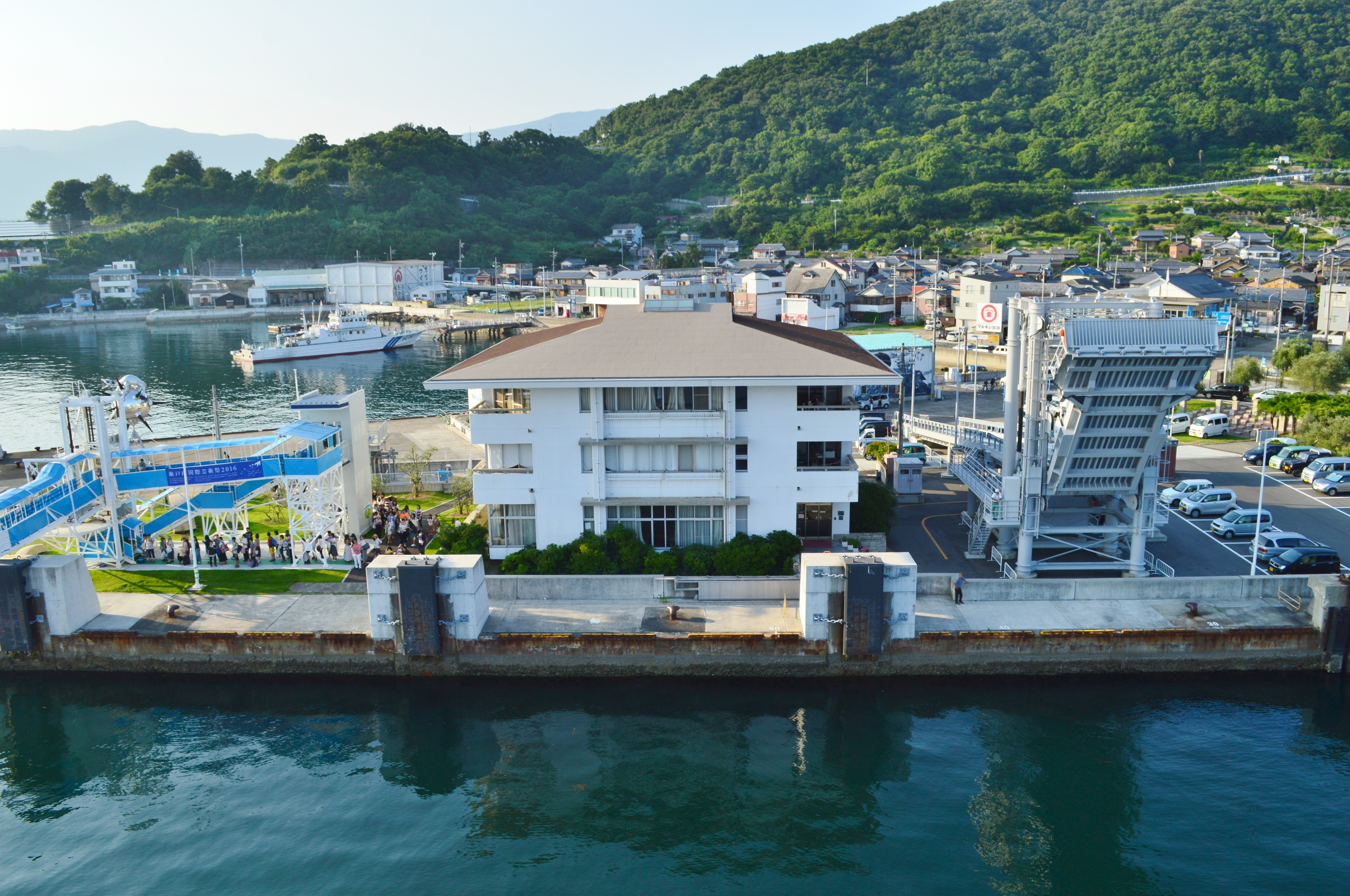 坂手港ターミナル